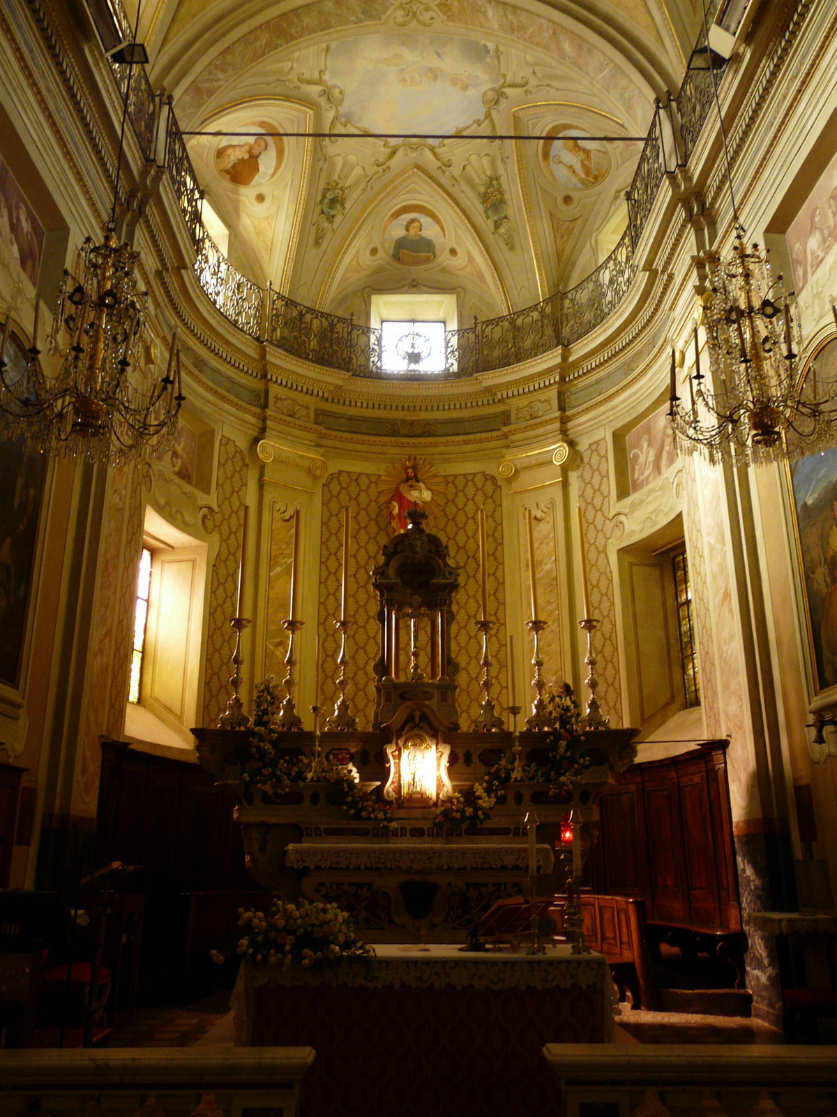 L'altare maggiore della chiesa di San Pietro apostolo, Savignone, Liguria, Italia